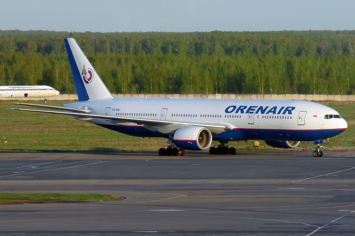 Orenair, VQ-BNU, Boeing 777-2Q8 ER